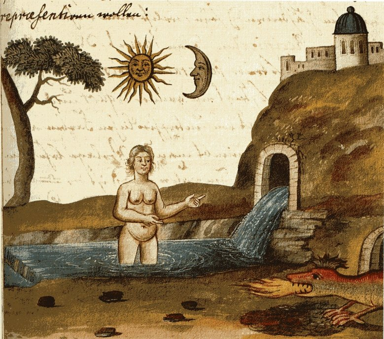 Immagine del manoscritto Zoroaster Clavis Artis, MS. Verginelli-Rota, Biblioteca dell'Accademia Nazionale dei Lincei, Roma, vol. 2, pag. 87